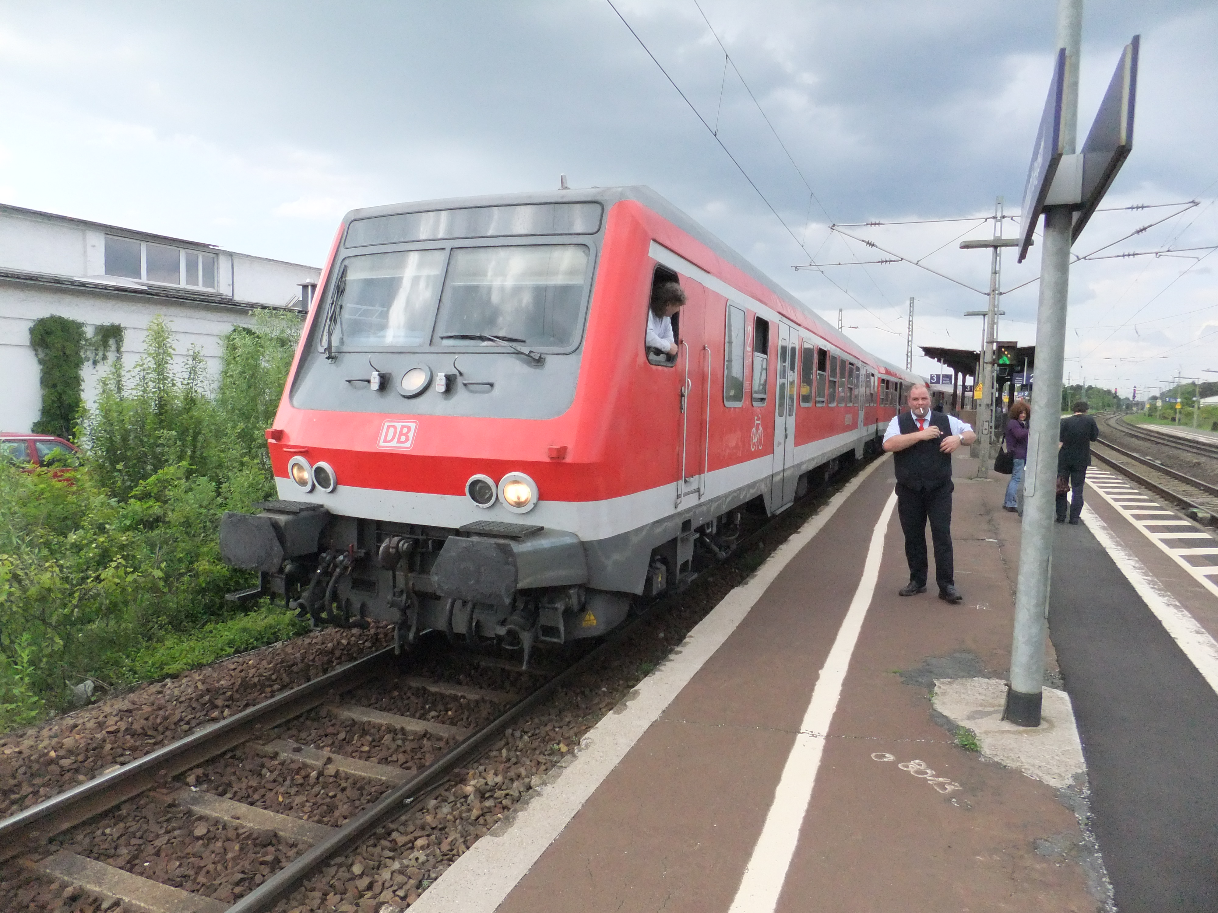 Regionalbahn auf der Main-Neckar-Eisenbahn von Frankfurt am Main Hauptbahnhof im Bickenbacher (Bergstraße) Bahnhof auf dem Weg nach Heidelberg Hauptbahnhof